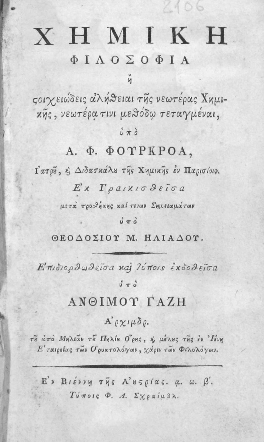 "Философия на химията" от Антоан Фуркроа, преведена на гръцки от Теодосиос Илиадис, Виена, 1802